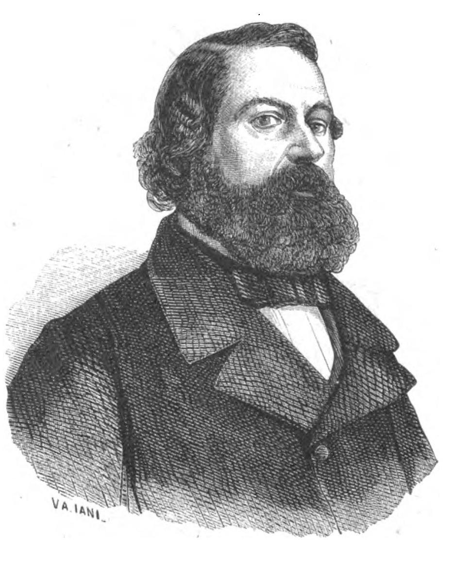 Depicted person: Alessandro Grassi – Italian politician